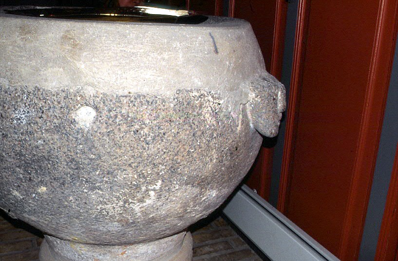 Bigum Kirke, døbeefont